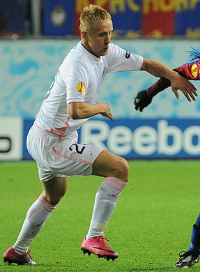 Kamil Glik.